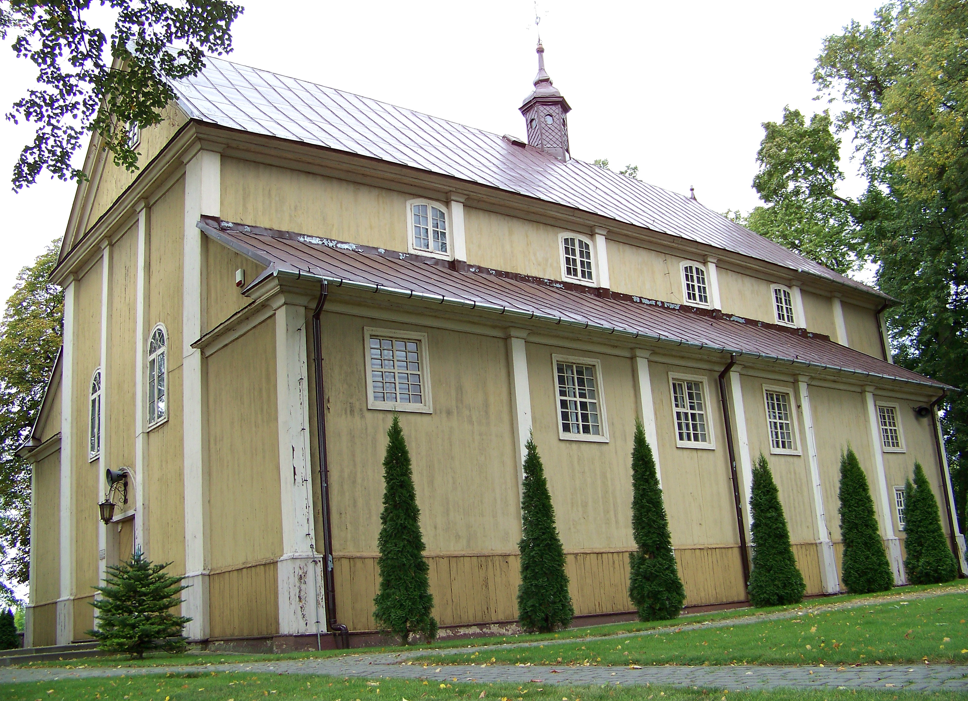 Przesmyki - kościół parafialny pw. św. Jakuba Ap.